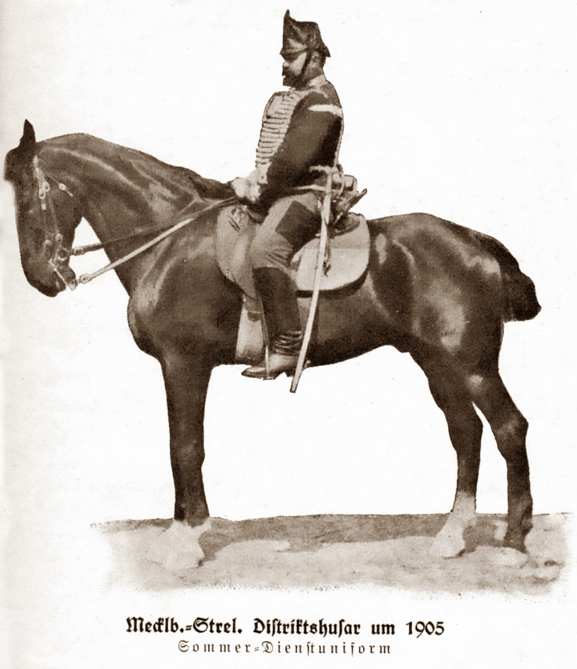 Neustrelitzer District-Husar zu Pferde in Sommeruniform im Jahr 1905.